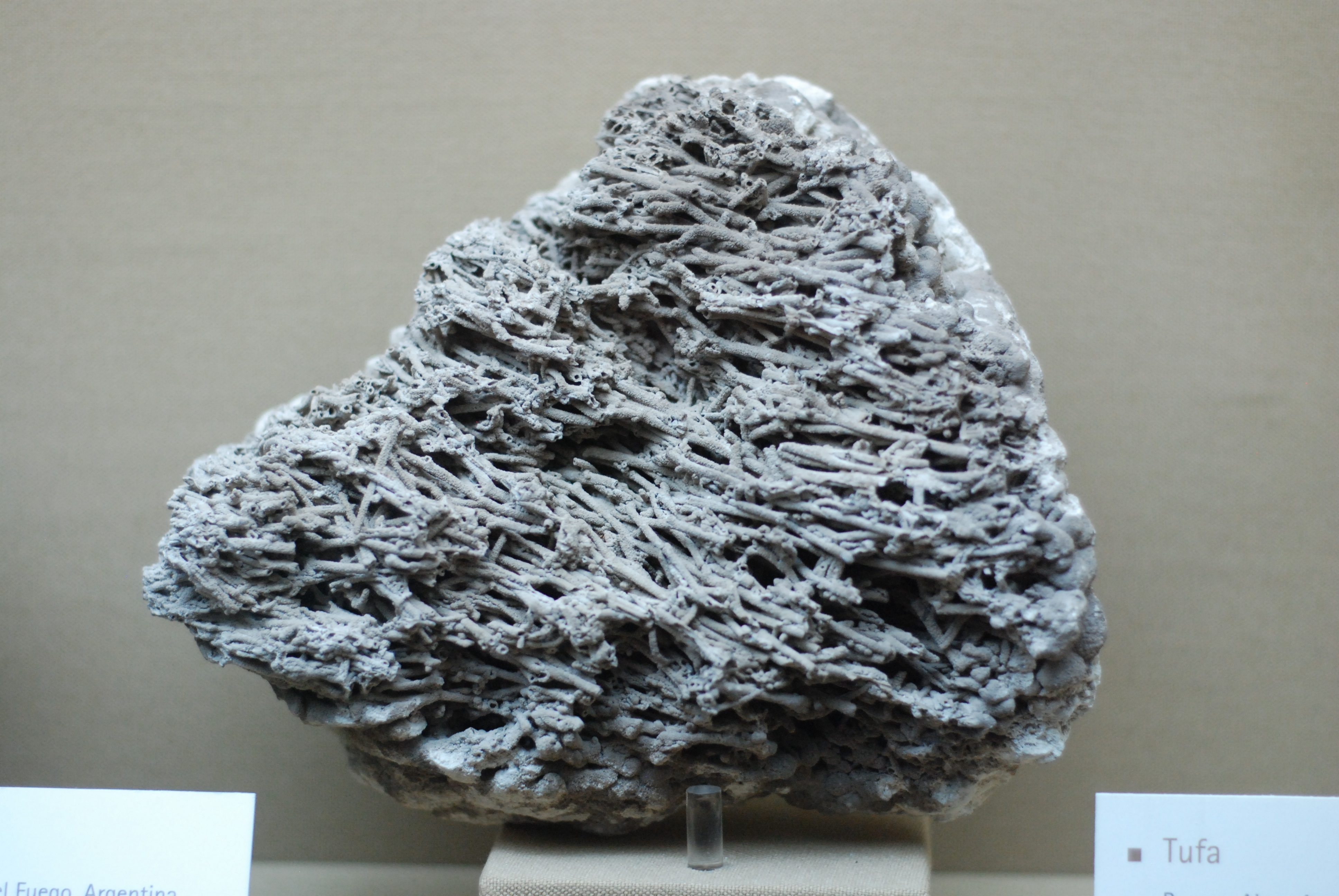 Tufa, Roca sediemtaria bioquímica. Los tubos corresponden a depósitos lacustres calcáreos en torno a tallos vegetales y/o anélidos, que al descomponerse dejan sus formas, Buenos Aires, Argentina.